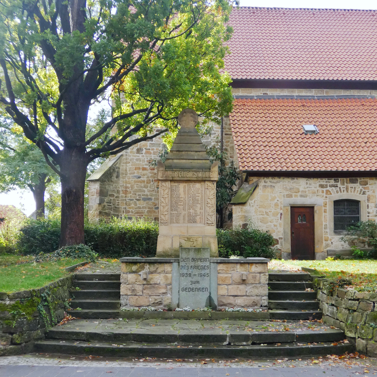 Das Gefallenendenkmal Gehrden an der Kirchstraße. Im Hintergrund die Sakristei der Margarethenkirche